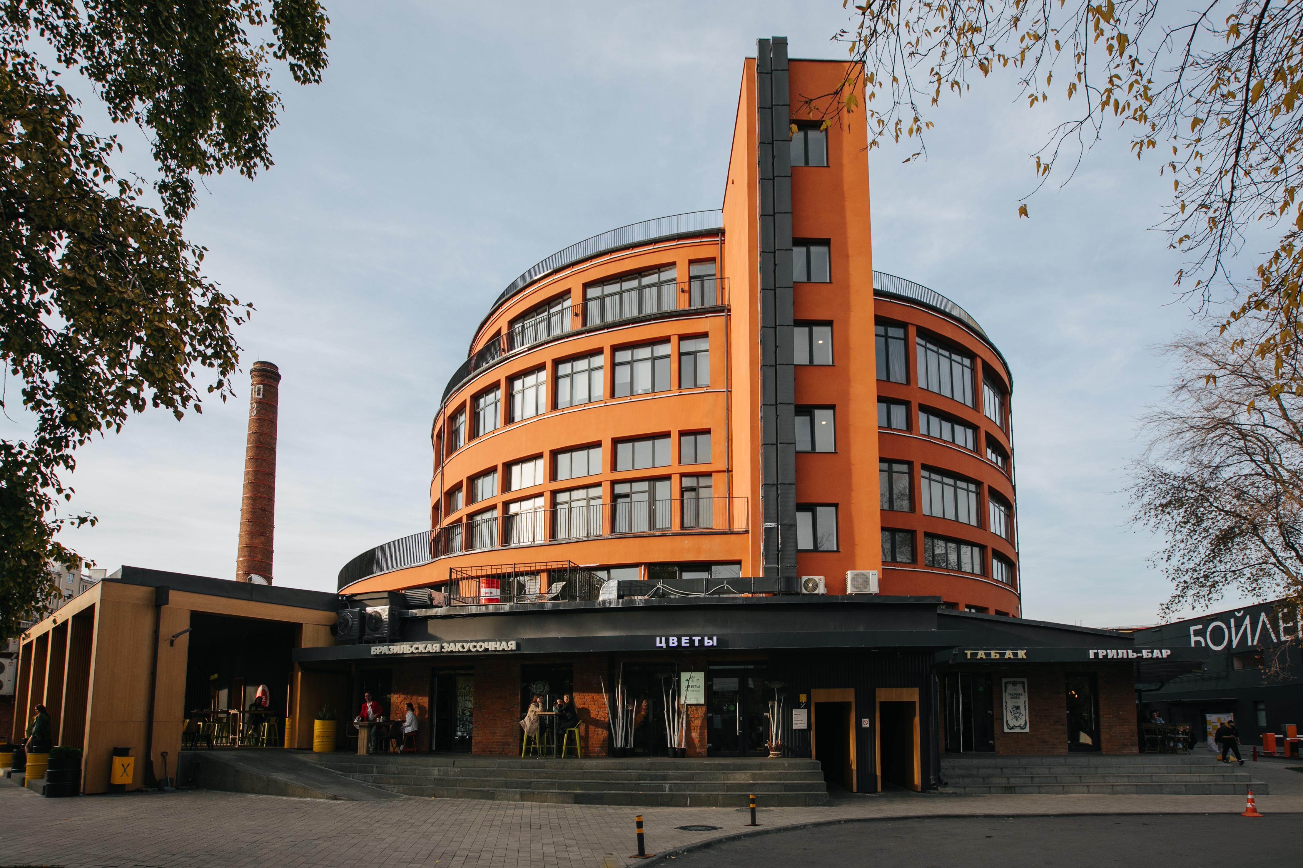 Хлебозавод - общественное пространство